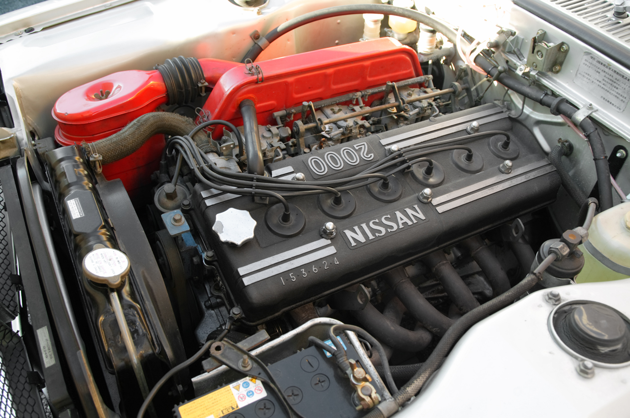 Nissan S20 engine on Skyline GT-R ( KPGC10 )